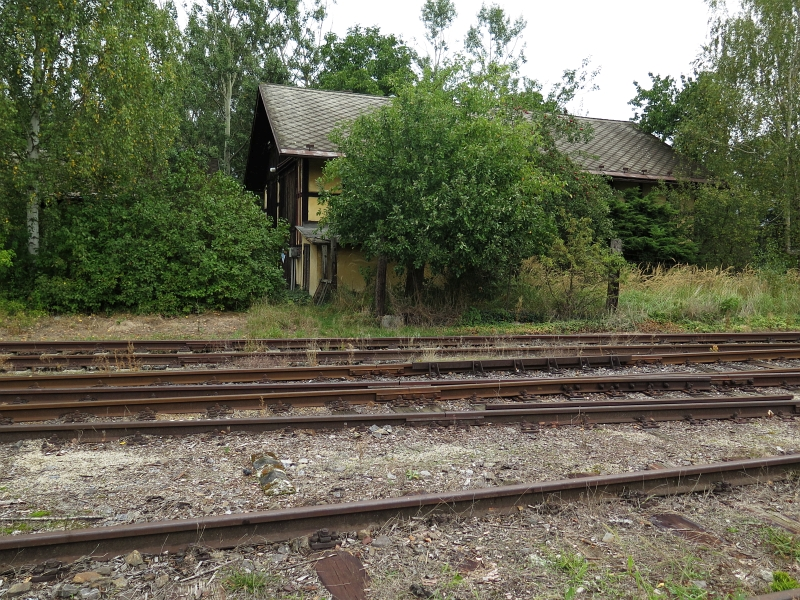 Nádražní výtopna, Netolice.